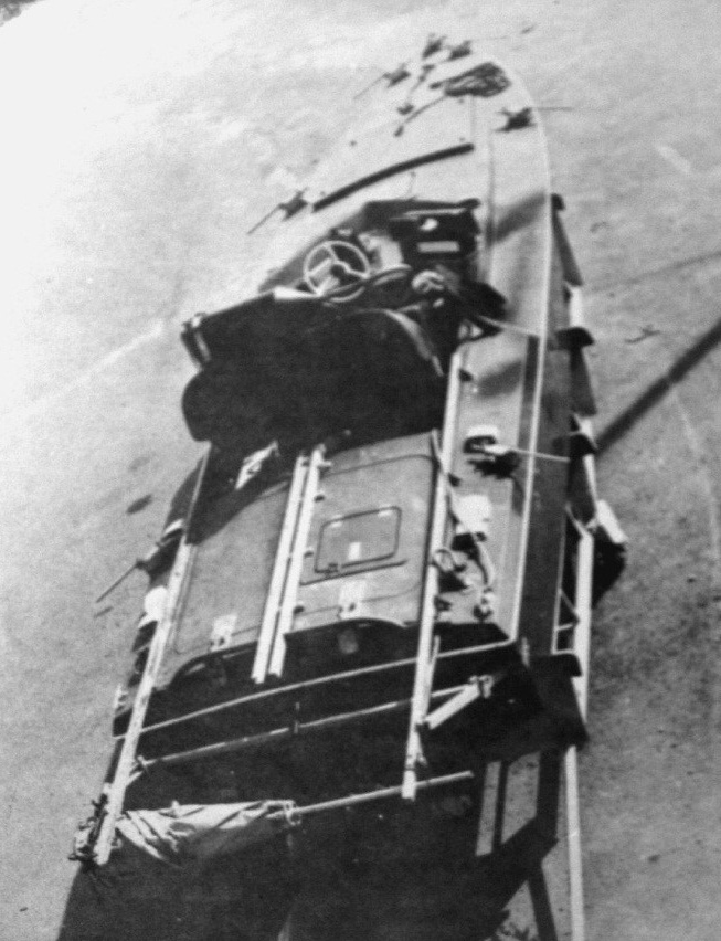 סירת סנונית במתכונת סירת נפץ 'פצחן' אוקטובר 1873